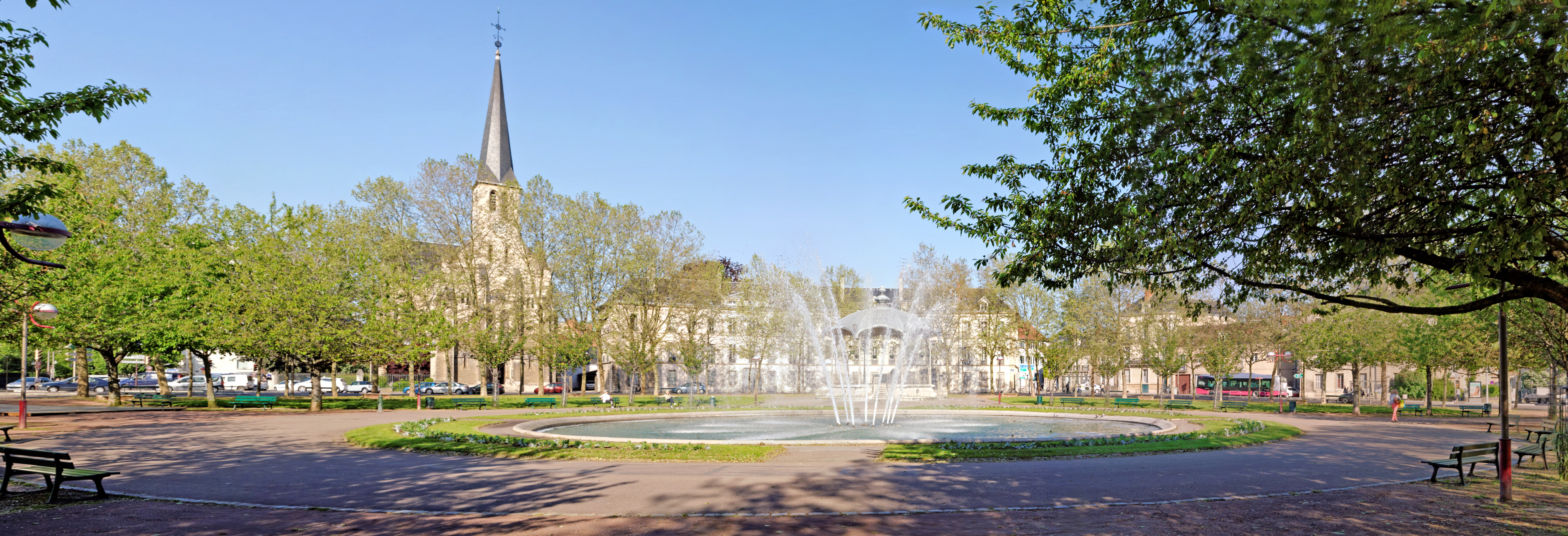 La place du Président Wilson, à Dijon un jour de grand soleil